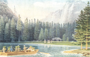 Erzherzog Johann von Österreich begegnet seiner späteren Frau Anna Plochl am Toplitzsee in Grundlsee, 1819